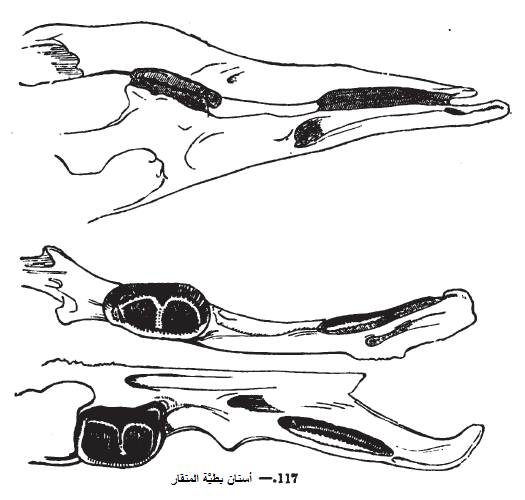 أسنان خُلد الماء.